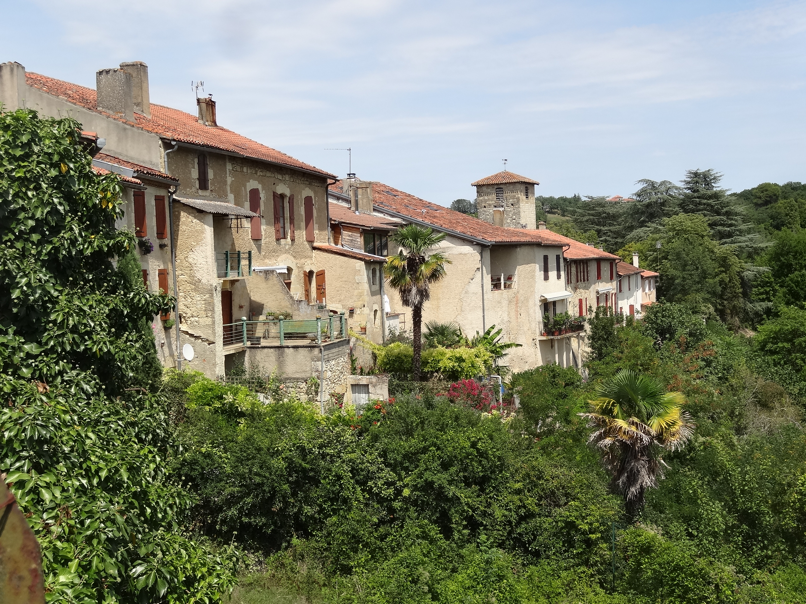 Biran.